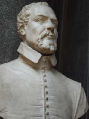 Buste de la galerie des batailles du château de Versailles